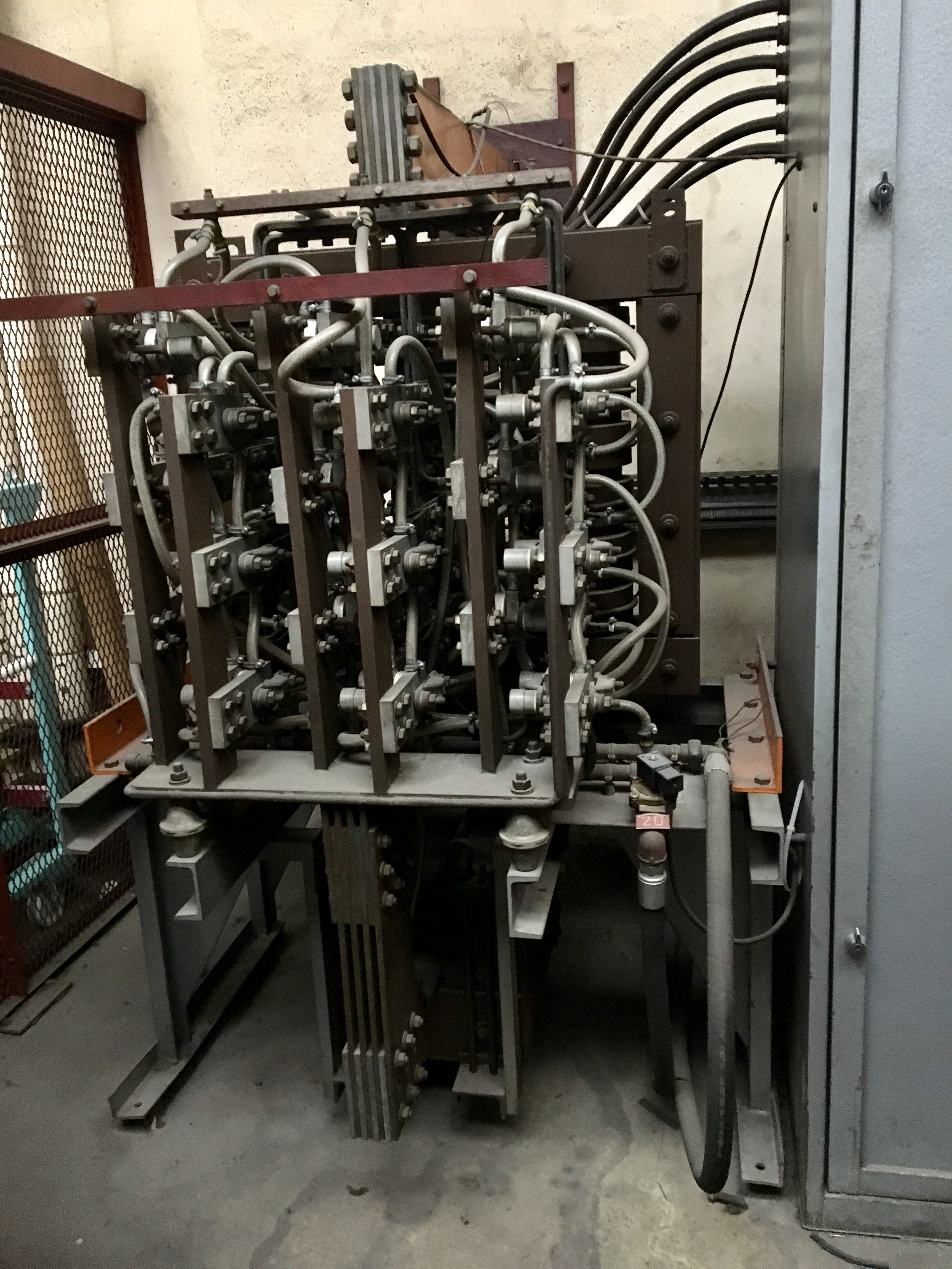 Banc de thyristors de puissance: 11V et 20 kA en continue soutenue plusieurs heures (40 kA maxi). Les thyristors sont refroidit par un circuit d'eau froide. La sortie du + sont les barres du haut, la sortie du - sont les barres du bas. Le banc est utilisé pour étalonner des disjoncteurs pour courant continu.